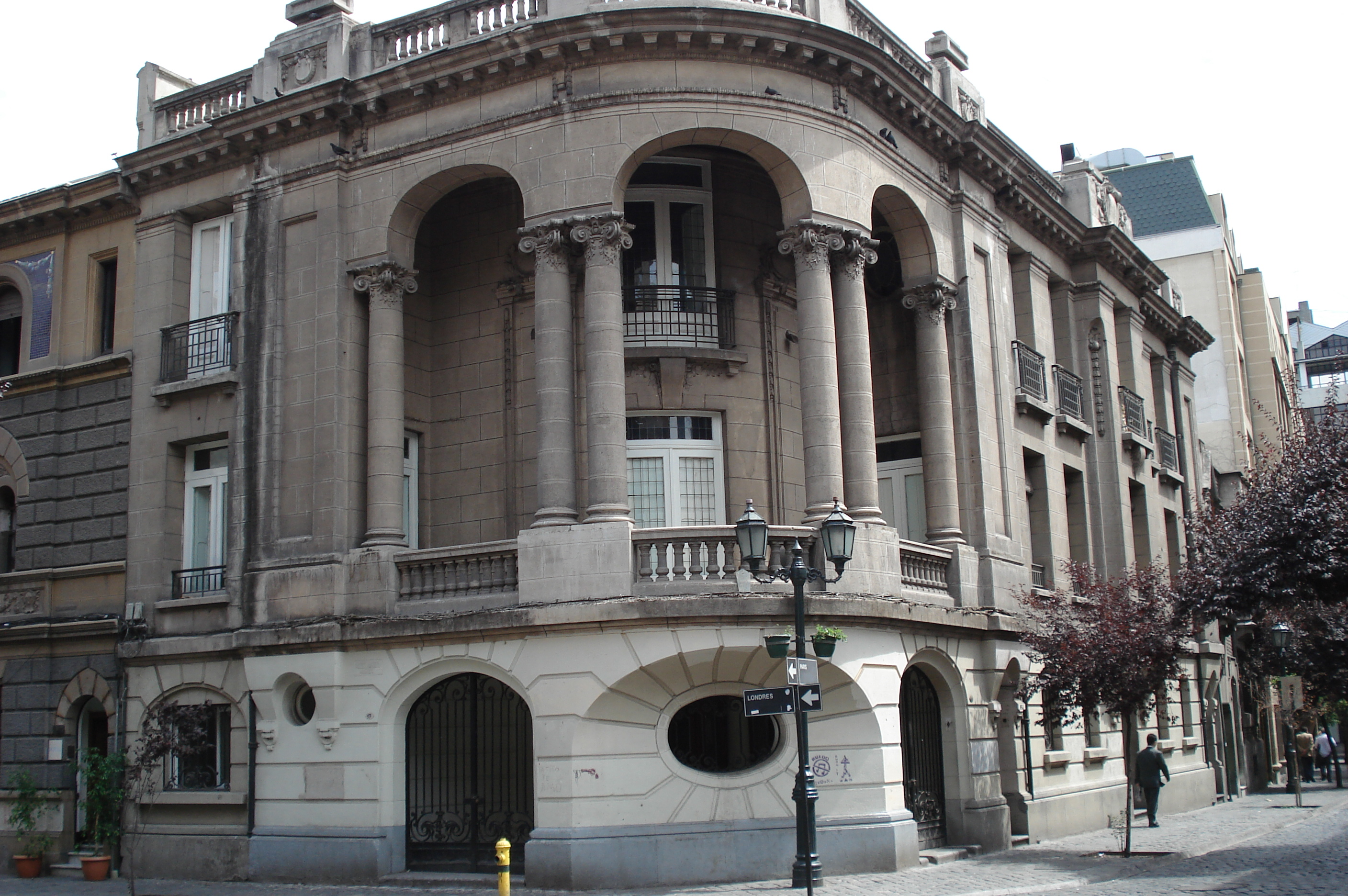 Sede de la Concertación de Partidos por la Democracia, ubicado en el barrio París-Londres de la ciudad de Santiago de Chile.